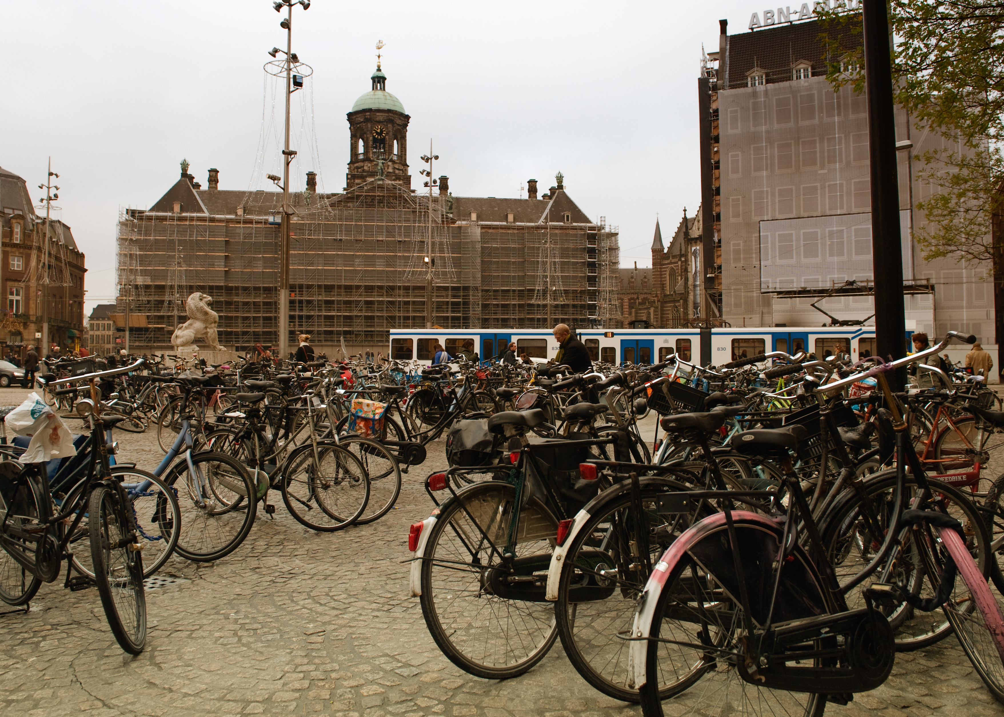 fietsen ...... veel fietsen